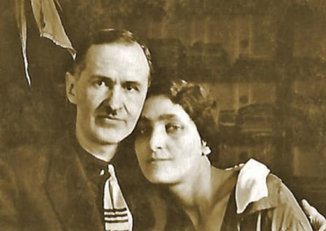 А. Р. Штам з жонкай А. М. Штам. 1930